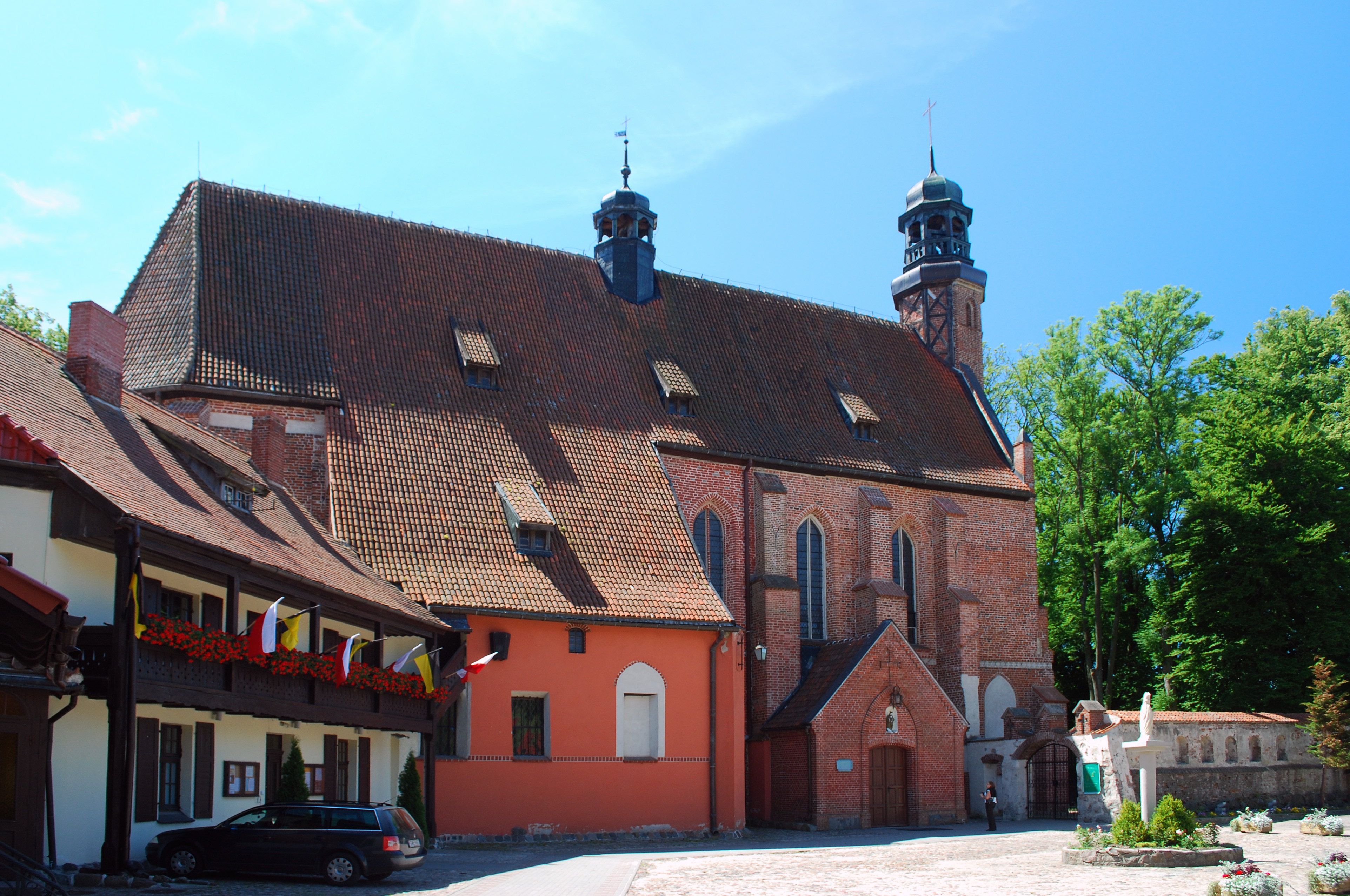 Koścół Wniebowzięcia Marii Panny w Żukowie od strony dziedzińca klasztornego.